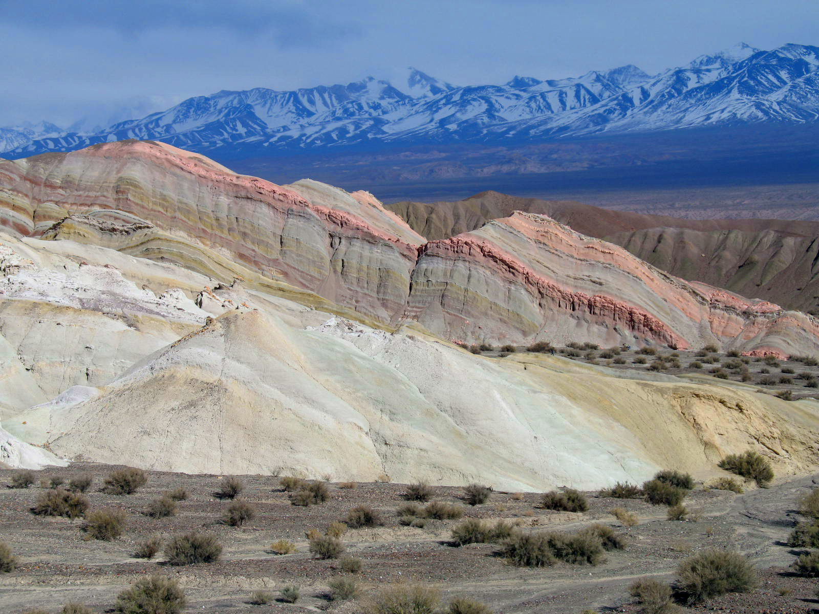 Paisaje de estratos de colores en Calingasta, provincia de San Juan, Argentina